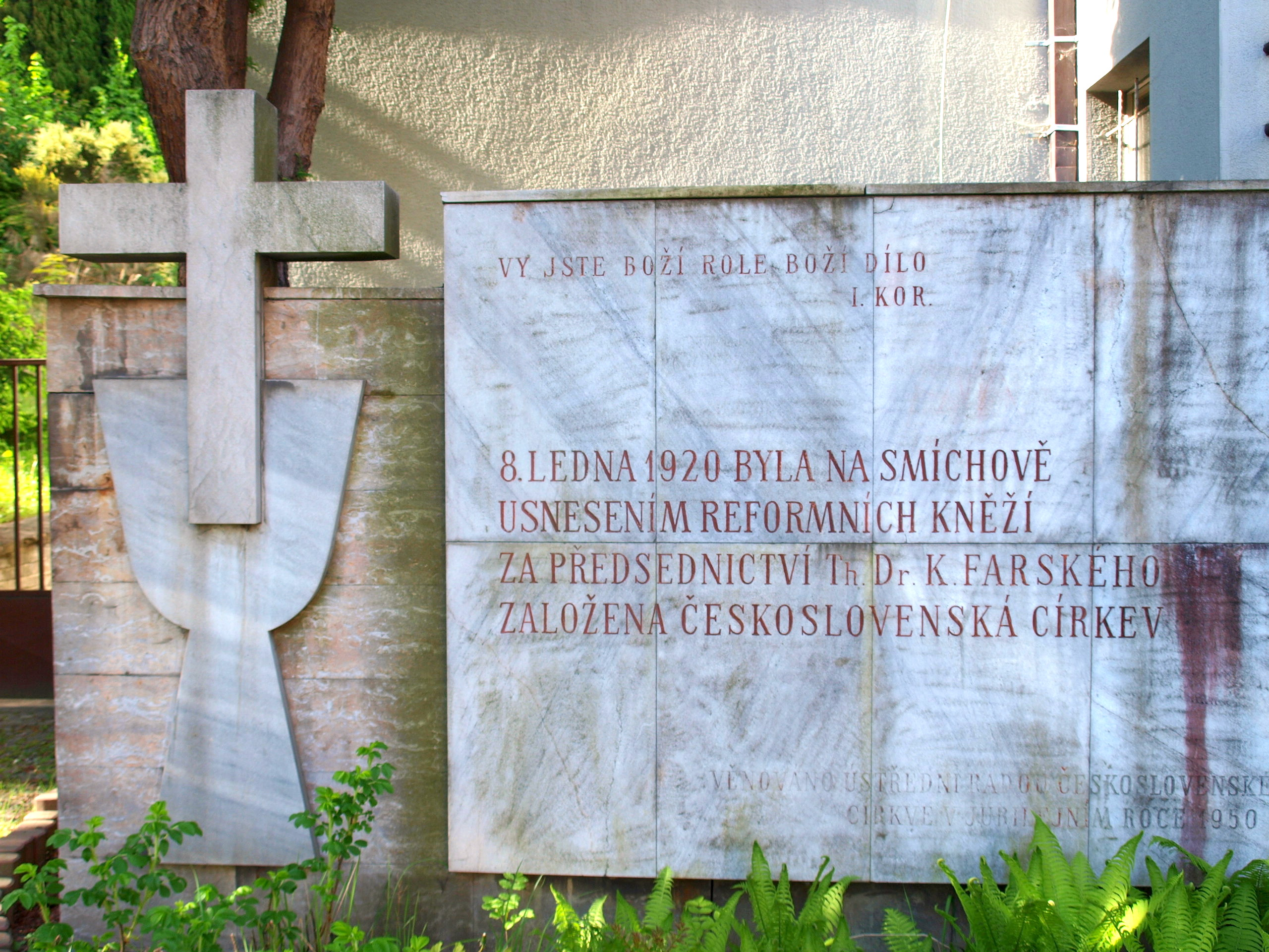 Husův sbor, Praha-Smíchov (Santoška)